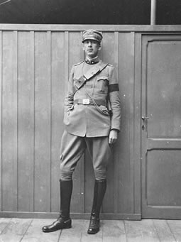 Leone Caetani durante la prima guerra mondiale